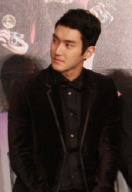 LG전자는 26일 저녁 대만 카오슝市에 위치한 '카오슝 아레나(Kaohsiung Arena)'에서 1만3천여 명의 관객이 운집한 가운데 열린 CJ주관 'M Live 콘서트'를 공식 후원했다. 콘서트에 앞서 공연장 인근 '샤또 데 신(CHATEAU de CHINE)' 호텔에서 LG 스마트폰 사용 고객 200명을 특별 초청해 'LG 옵티머스 슈퍼주니어 팬미팅' 행사를 개최했다.